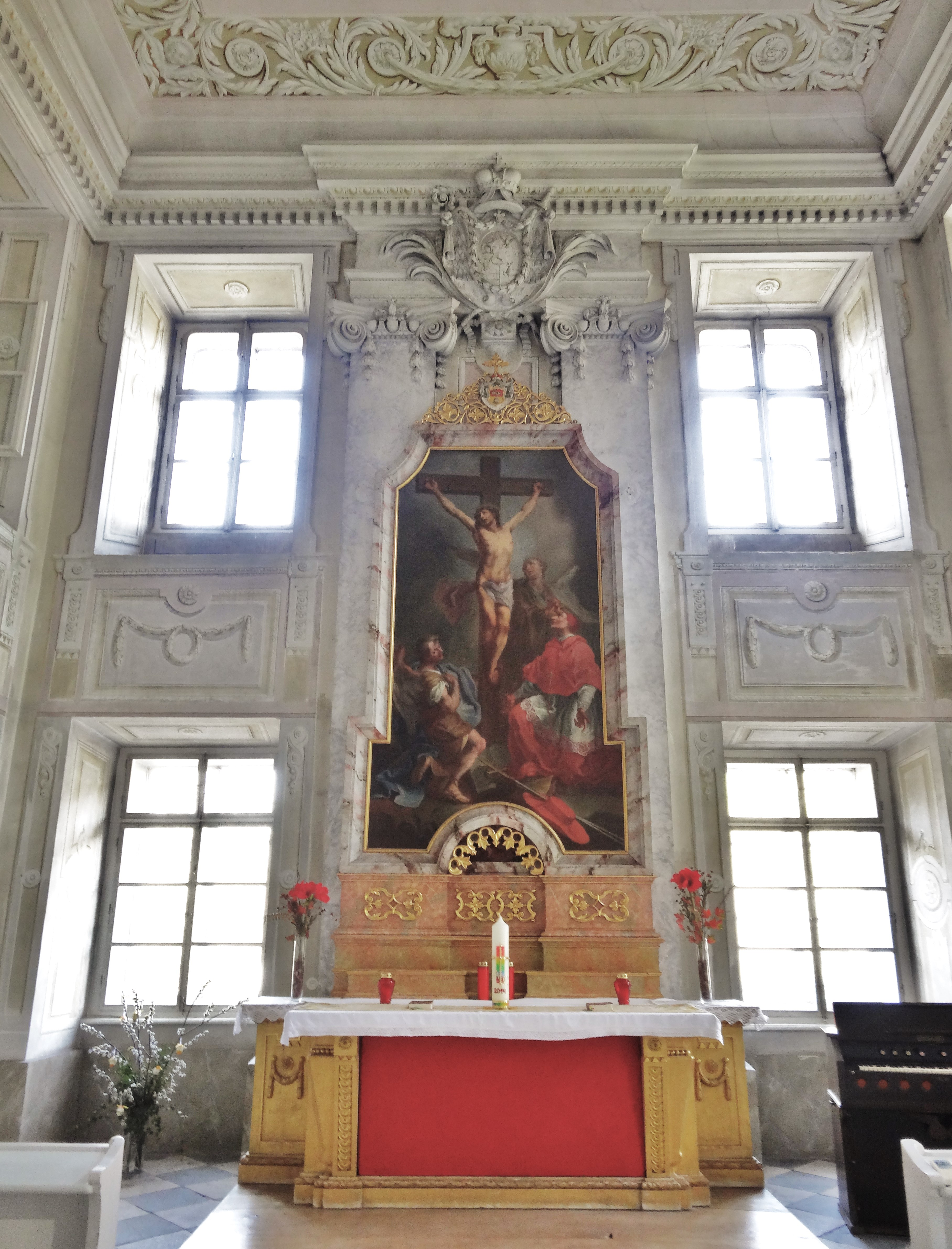 Schloss Pöckstein, Blick gegen den Altar. Über den Altar Wappen von Joseph Franz Anton Kardinal von Auersperg, Bischof von Lavant (1763 - 1764), Bischof von Gurk (1773 - 1784), Bischof von Passau (1784 - 1795). Siehe auch sein Siegel